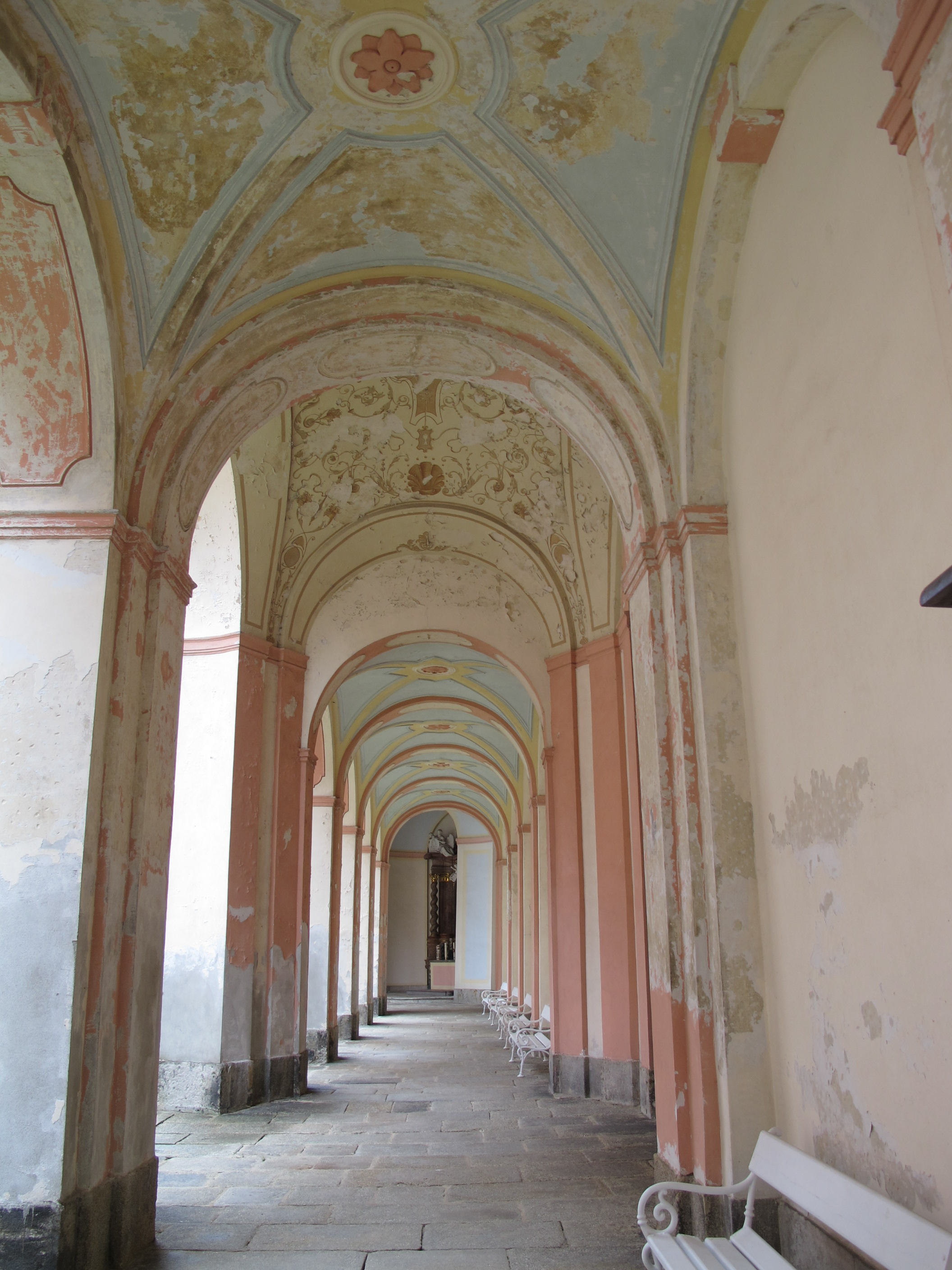 Kreuzgang im Kloster in Mariakulm (Chlum Svaté Maří), Juli 2014